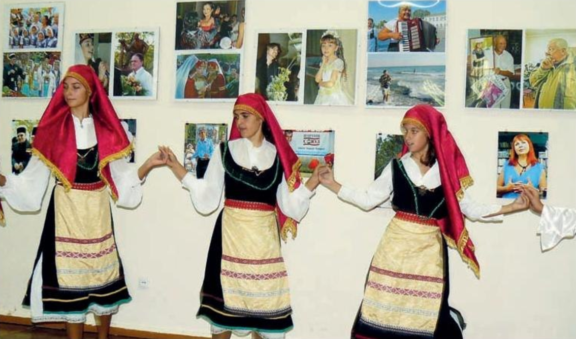 Дні кримчацької культури в Євпаторійському міському краєзнавчому музеї